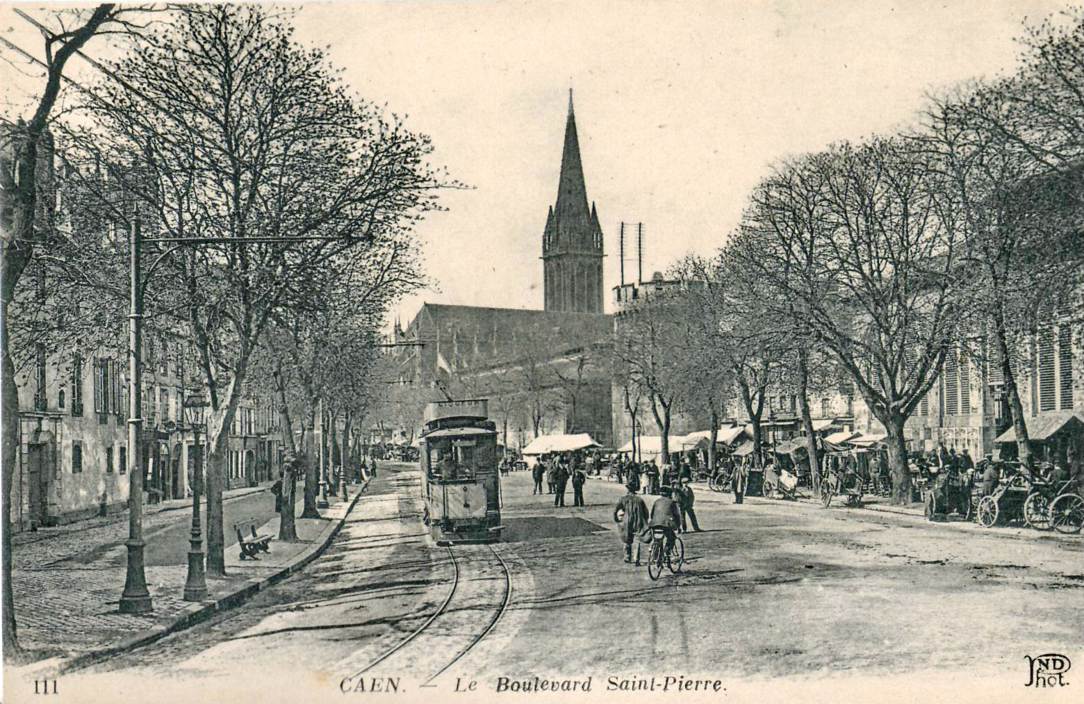 Carte postale ancienne éditée par ND, n°111 : CAEN - Le Boulevard Saint-Pierre